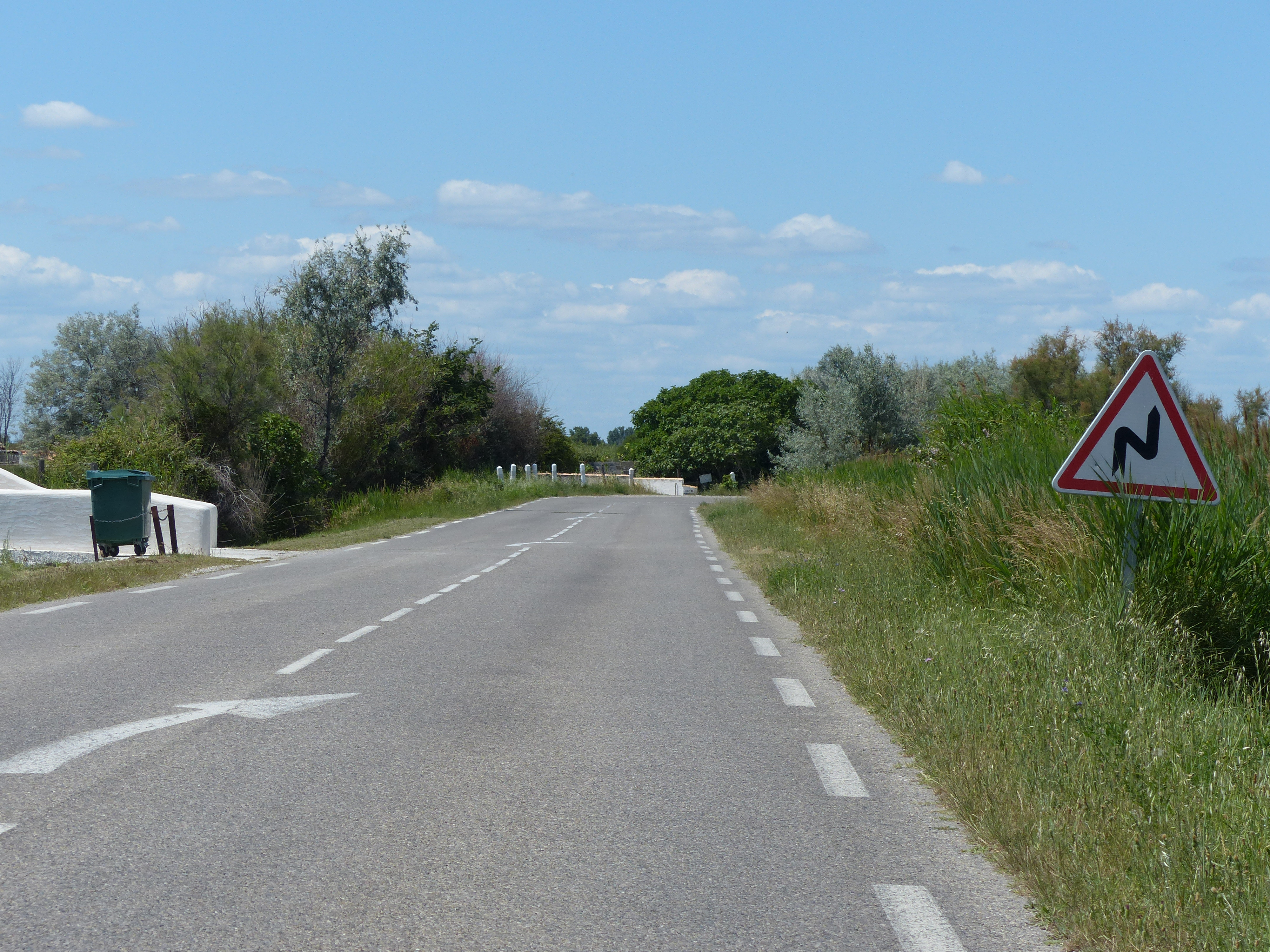 Panneau A1c avant virage à droite, D570, Camargue, Bouches-du-Rhône, France.